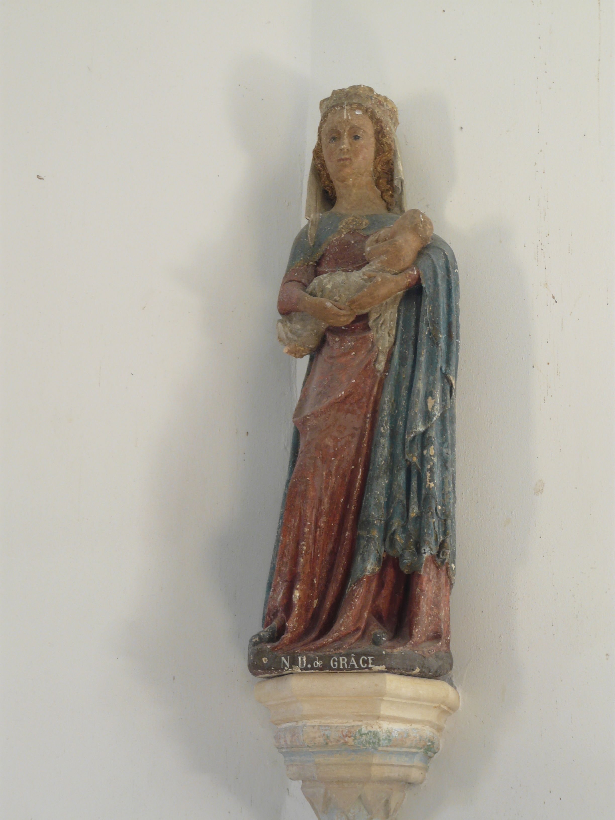 Vierge allaitante de la Chapelle de la Magdeleine au Gâvre